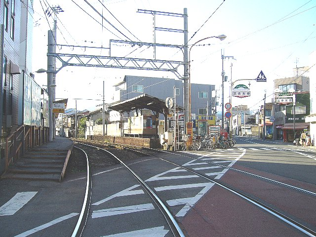 京福電気鉄道（嵐電） 蚕ノ社駅 ホーム 西望 2006年3月 Bakkai撮影